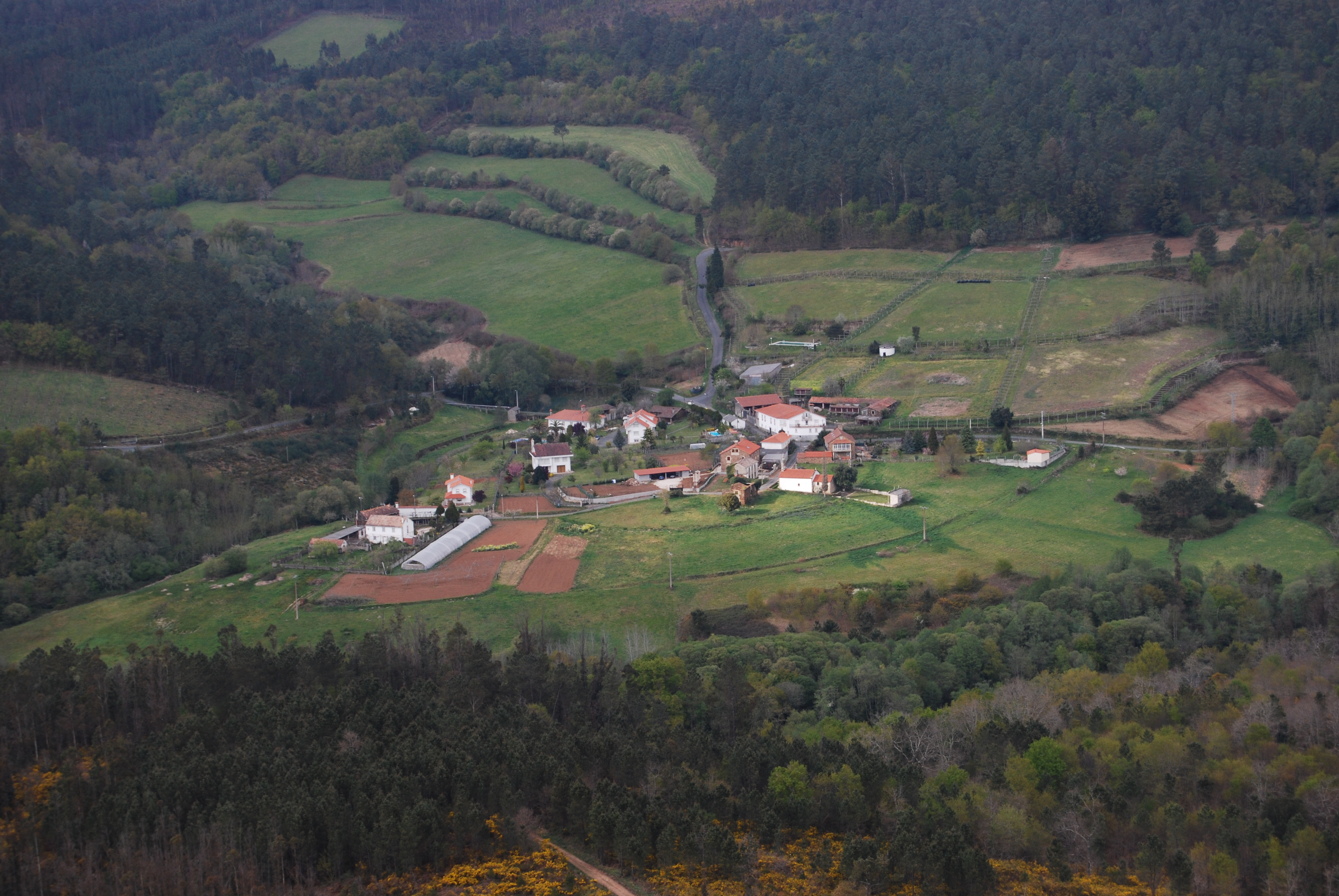 Donas, Boqueixón. Vista desde San Miguel de Castro